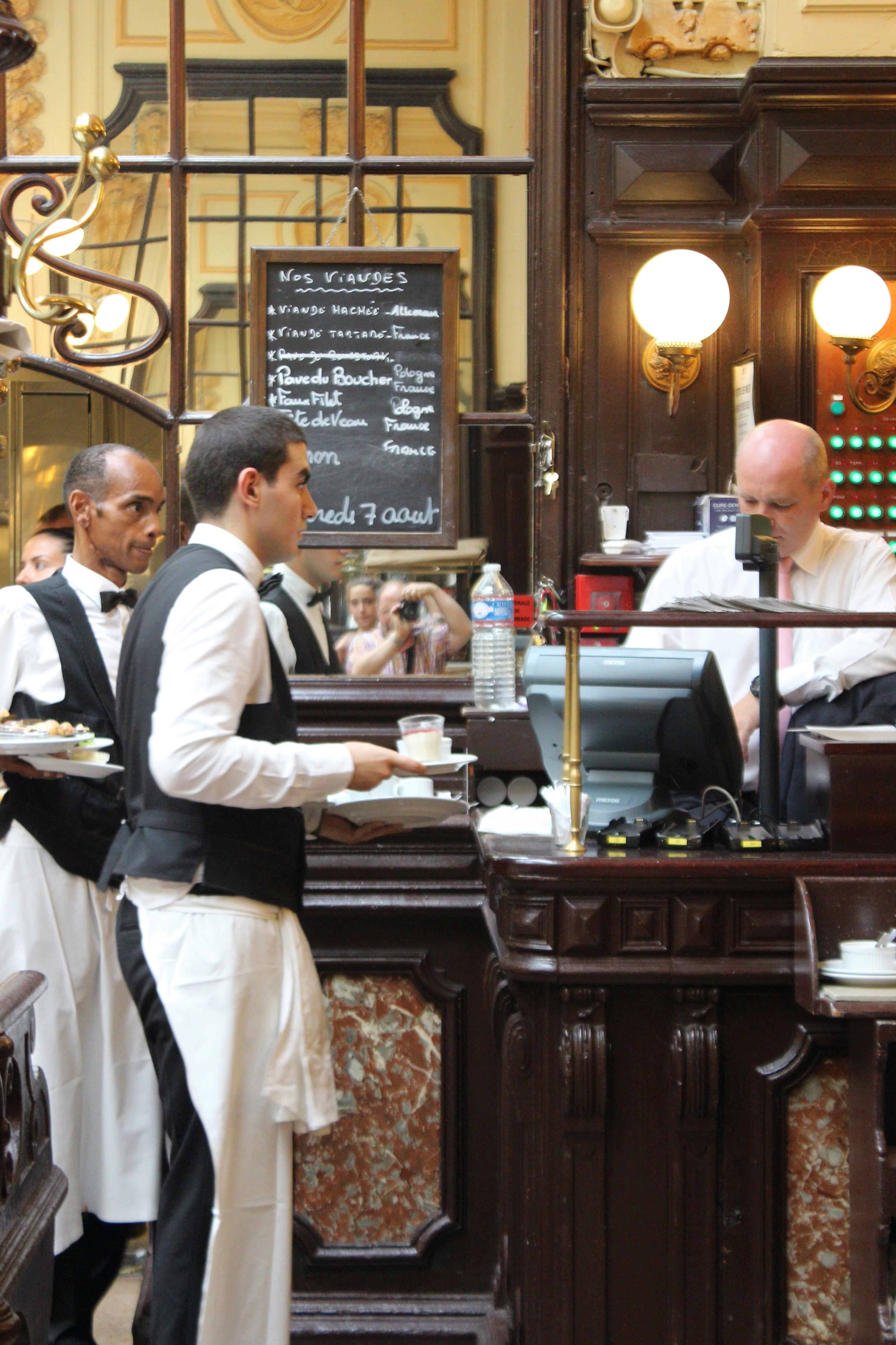 Bouillon Chartier, 7 rue du Faubourg Montmartre, Paris 9e